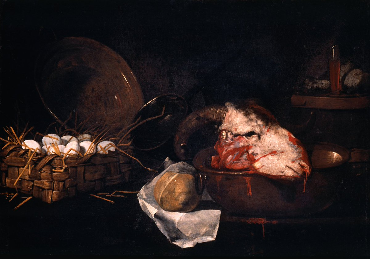 Interno di cucina con testa di caprone